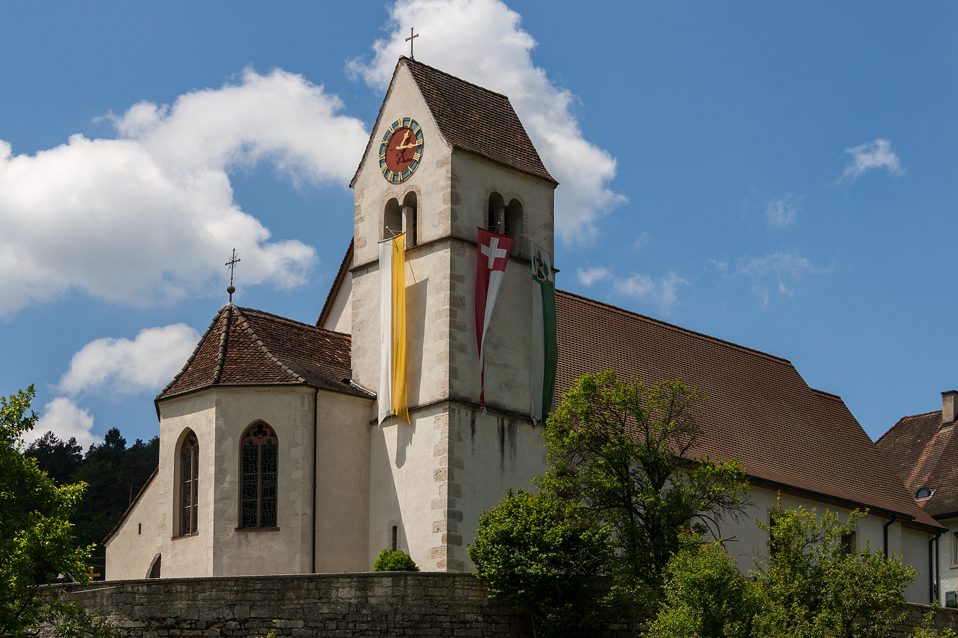 Kirche in Dittingen (BL)